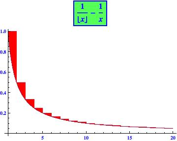 La konstanto de Eŭlero-Mascheroni egalas al la oranĝkolora areo inter la du grafikaĵoj